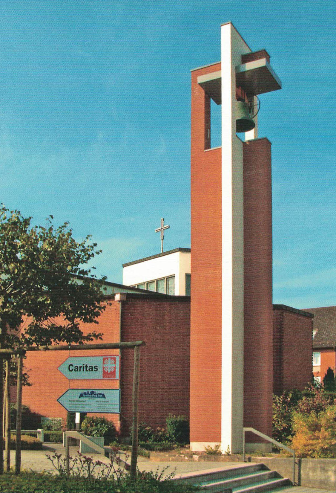 Katholische Kirche St. Marien in Alfeld an der Leine.